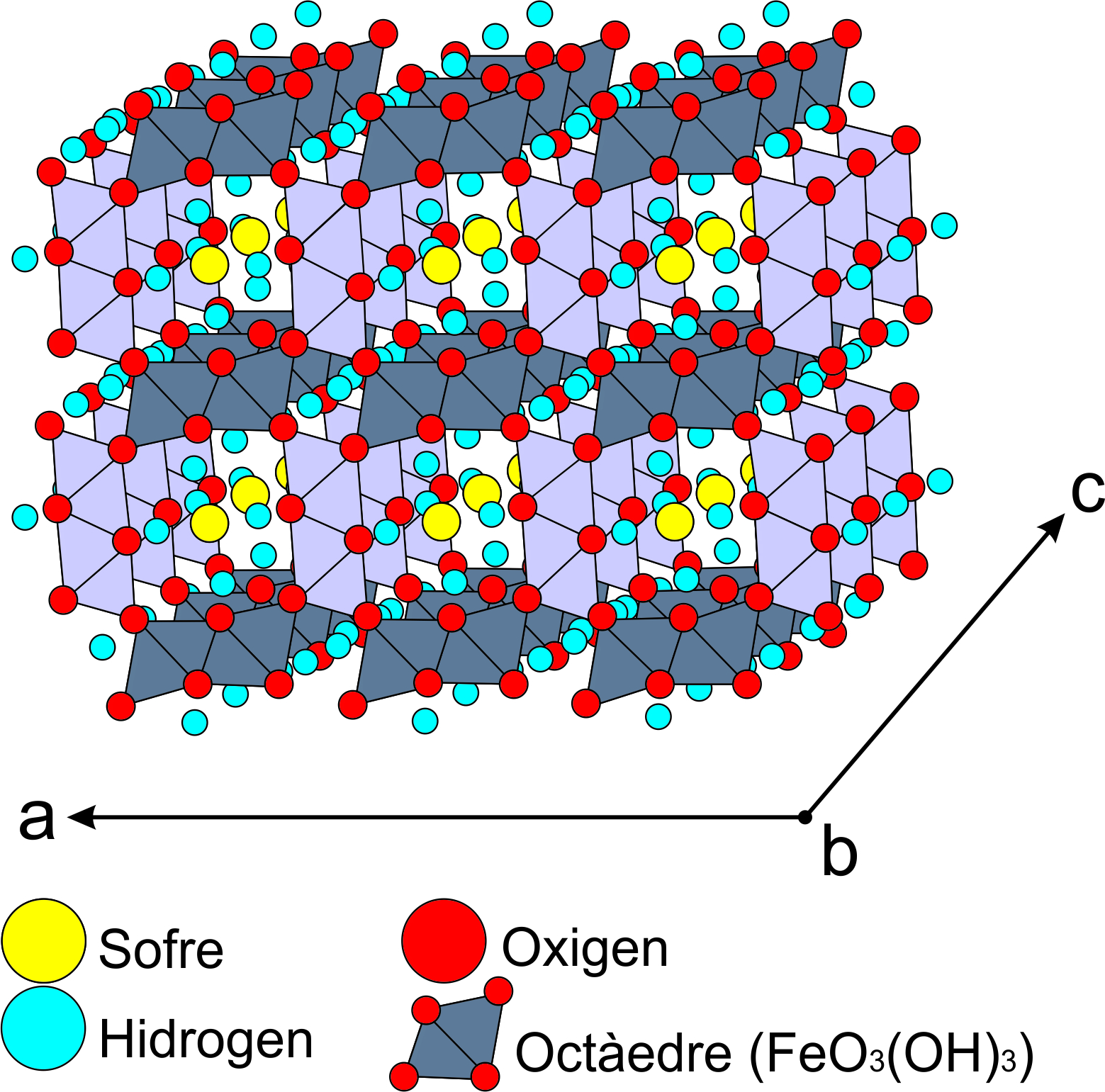 Estructura cristal·lina de la schwertmannita en tres dimensions